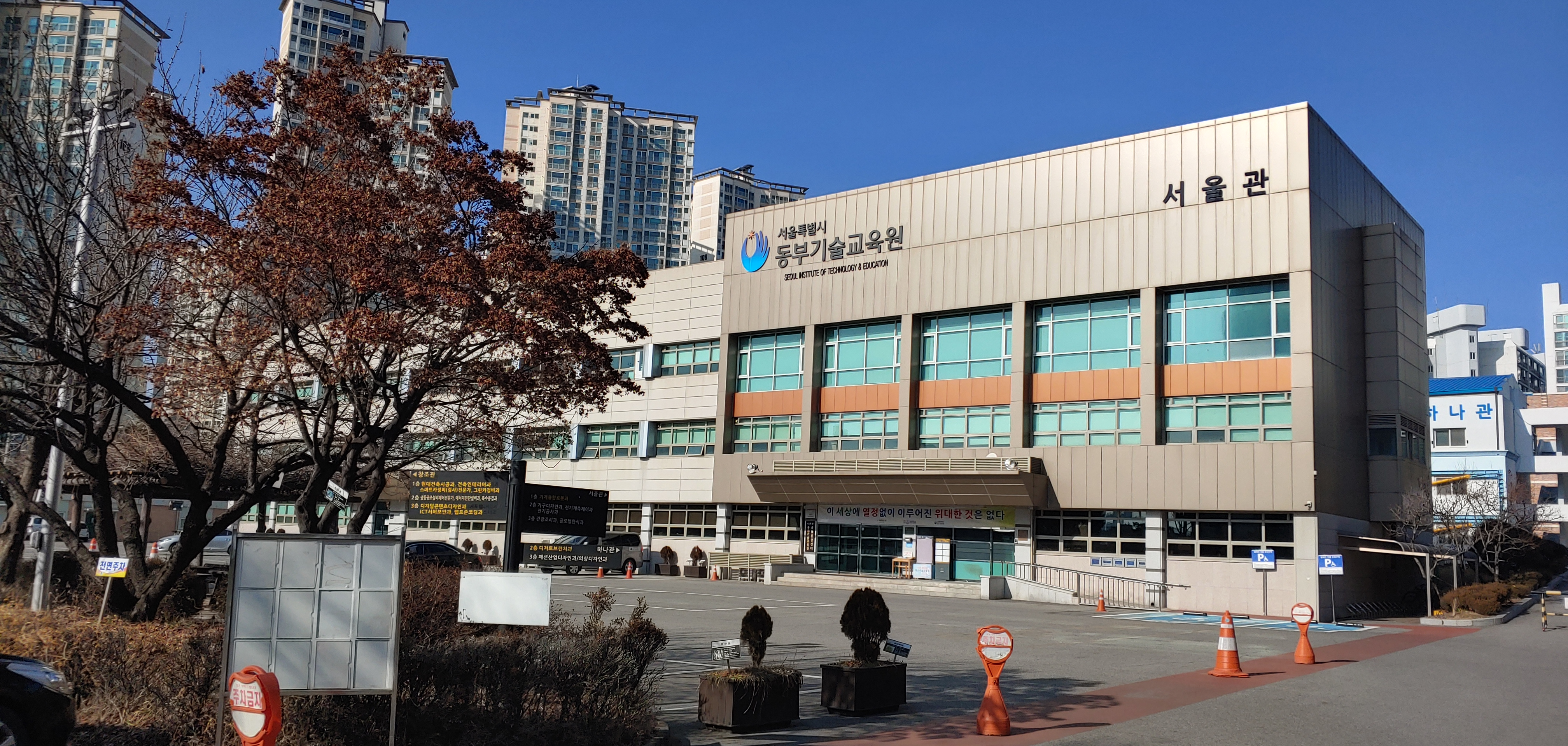 동부기술교육원, 강동구 명일동